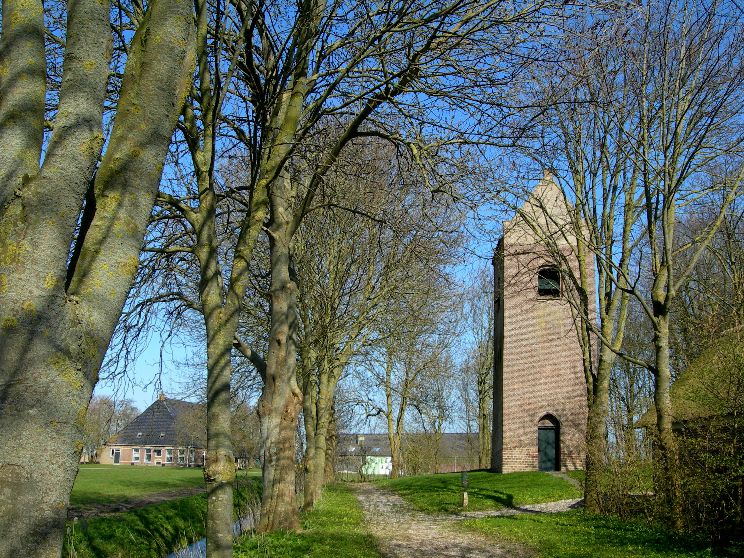 Miedum De Kerktoren